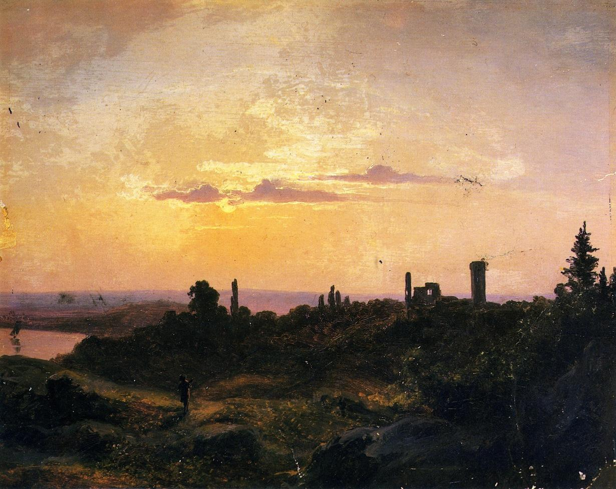 Sunset in Saxony